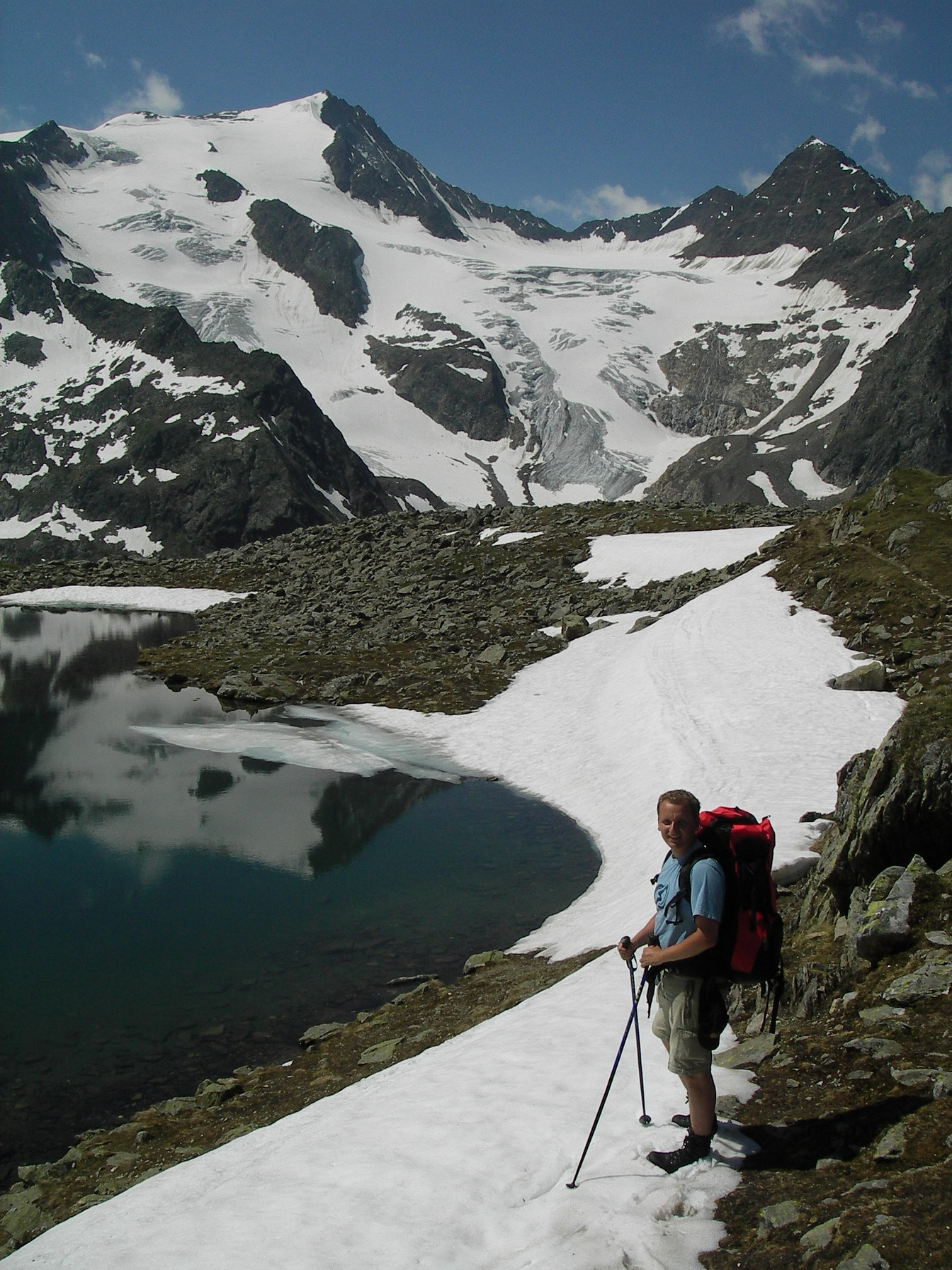 Gletscher am Freiger im Stubaital